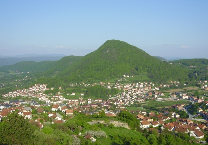 Pogled na Mrkonjić Grad